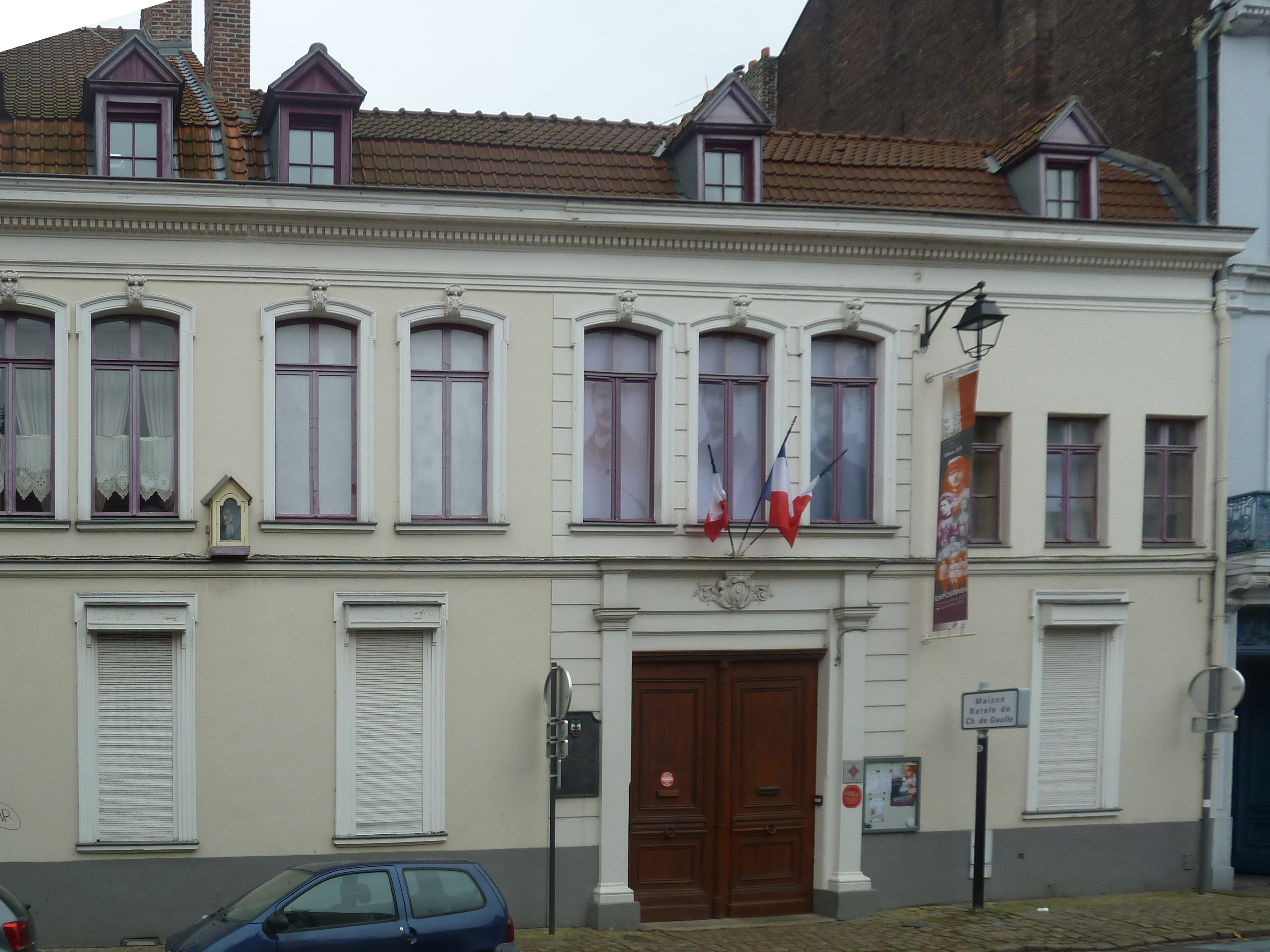 9 rue Princesse Maison natale de Charles de Gaulle, Lille Nord (département français) .